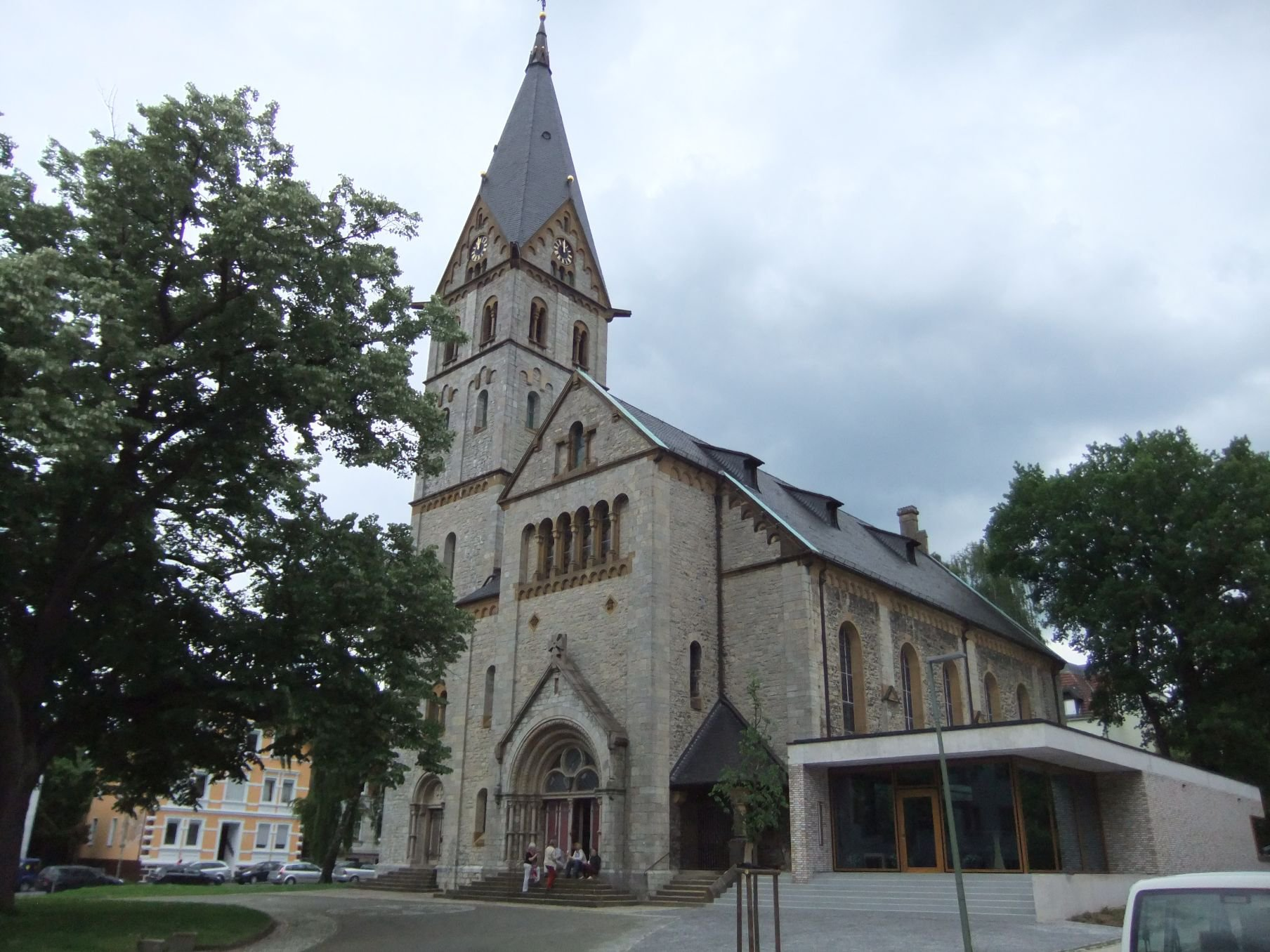 Johanniskirche in Bielefeld-Mitte. Mai 2014. Rechts der Anbau der Gemeinde.